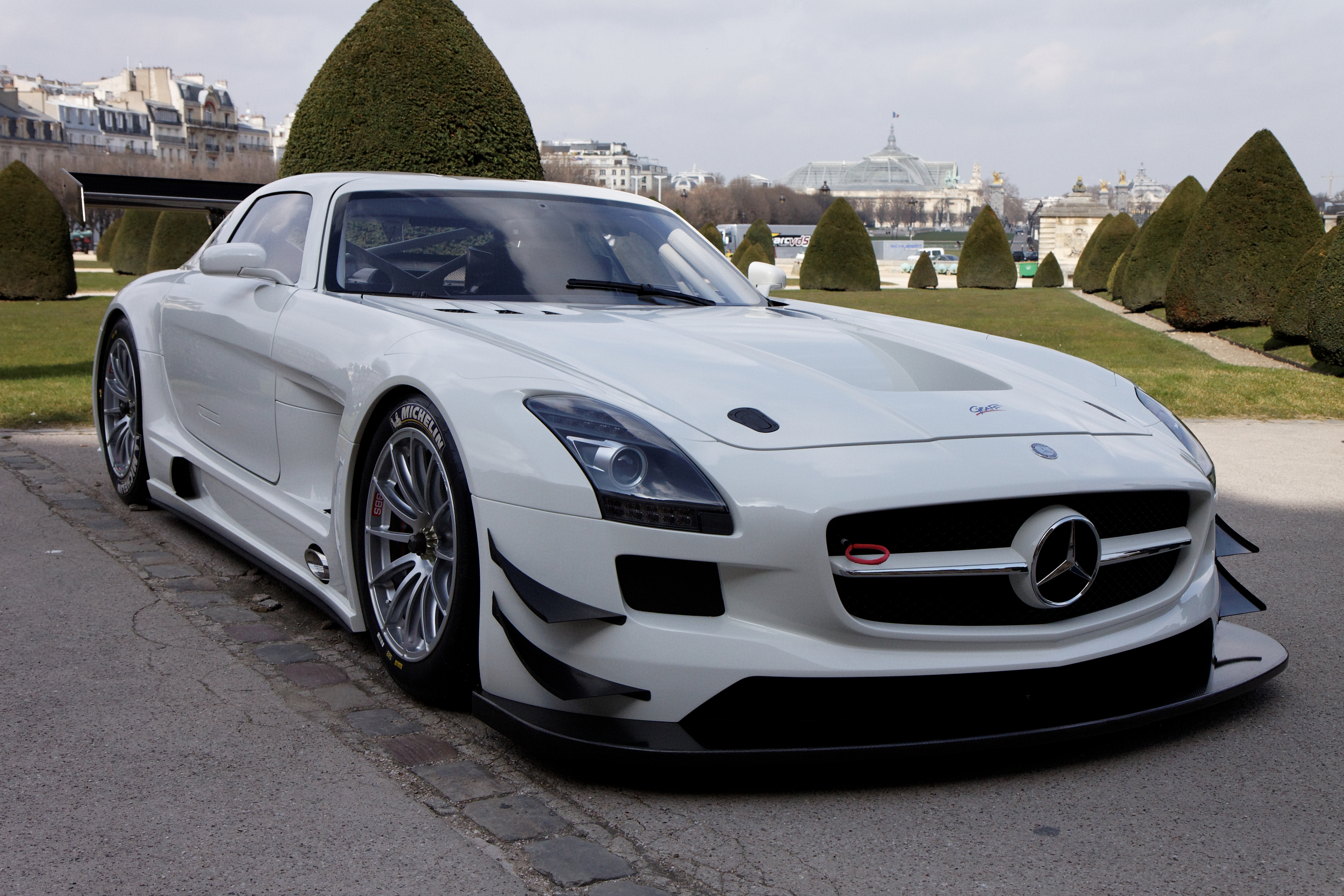 Photographie prise lors de la présentation du Blancpain Endurance series aux Invalides à Paris en mars 2011.